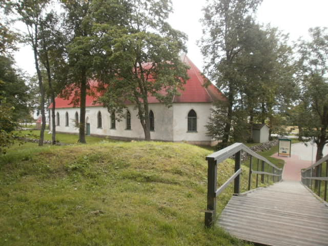 Vaade põhjabastionilt kiriku suunas.